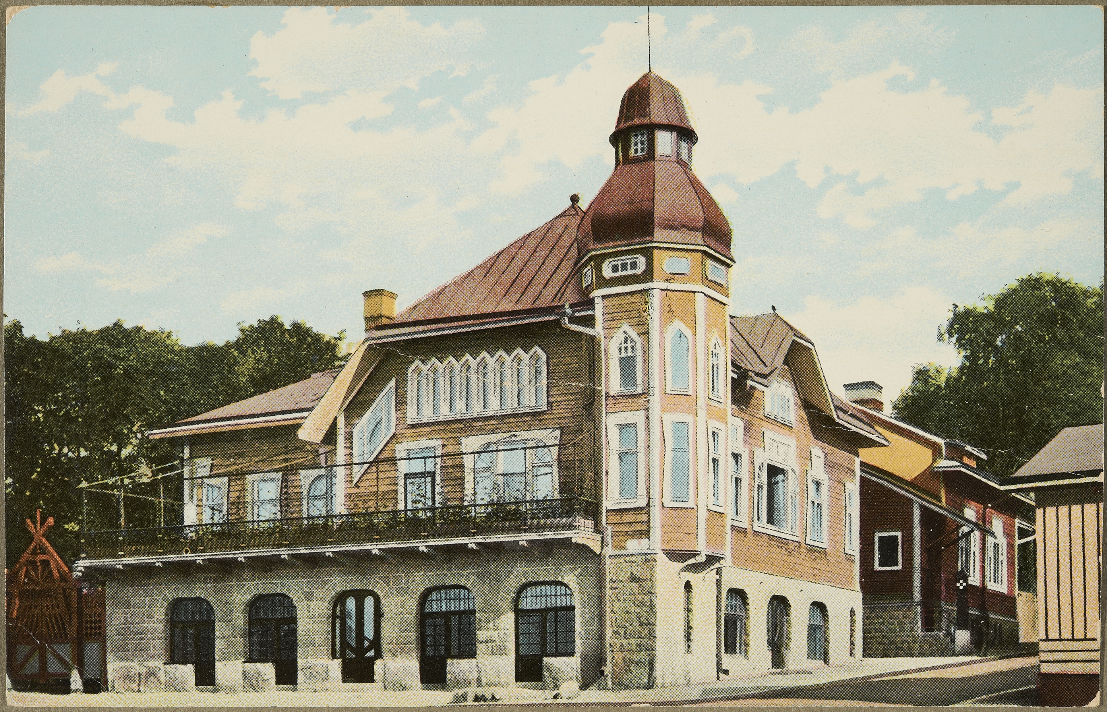 Postikortti Museoviraston kokoelmista (Historian kuvakokoelma). Kuvassa on Tampereen Laukontorilla sijainnut vanha Kauppaseuran talo. Rakennuksen suunnitteli August Krook. Talo valmistui 1905, ja se purettiin 1956.